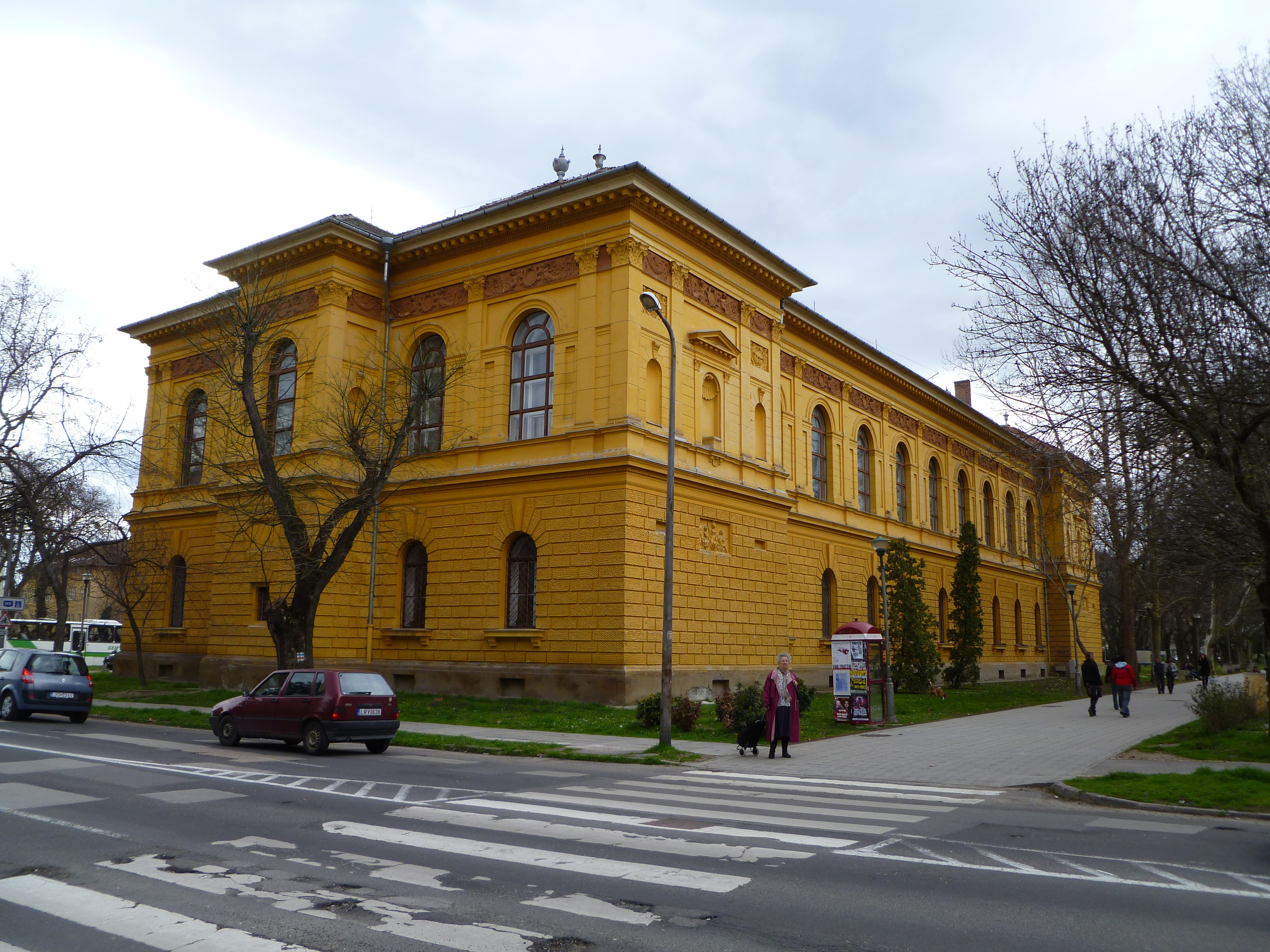 vármegyei múzeum, Szekszárd This is a photo of a monument in Hungary. Identifier: 8760